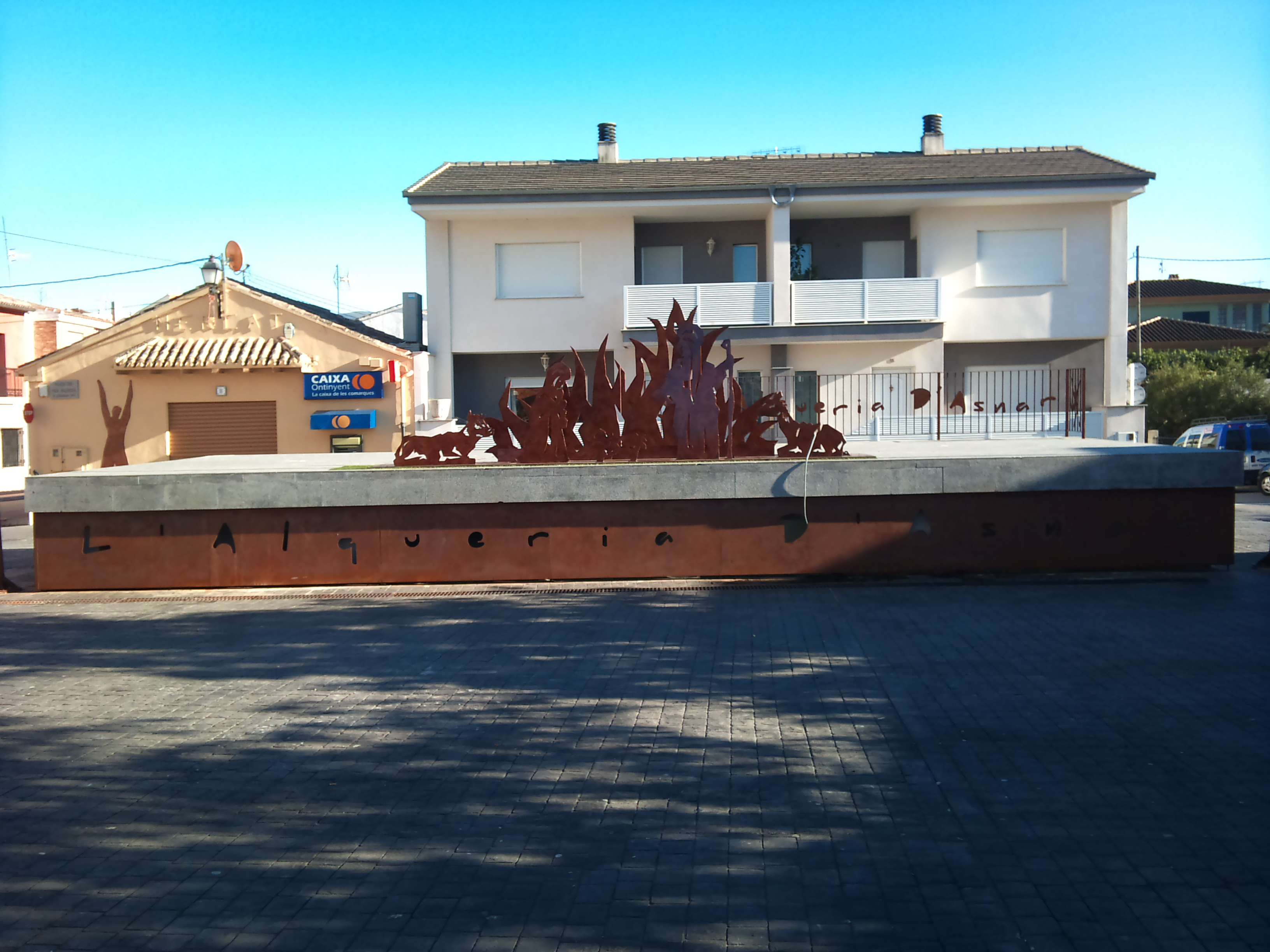 Betlem de ferro a la Plaça de l'Alqueria d'Asnar, El Comtat.